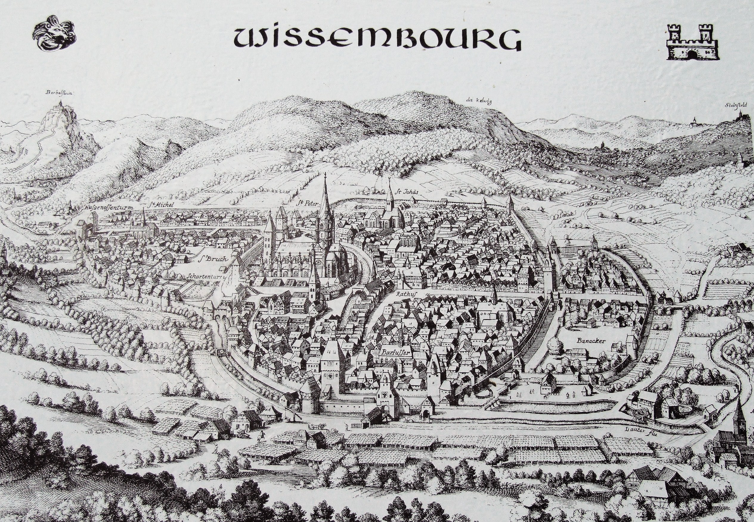 Wissembourg au 17ème siècle